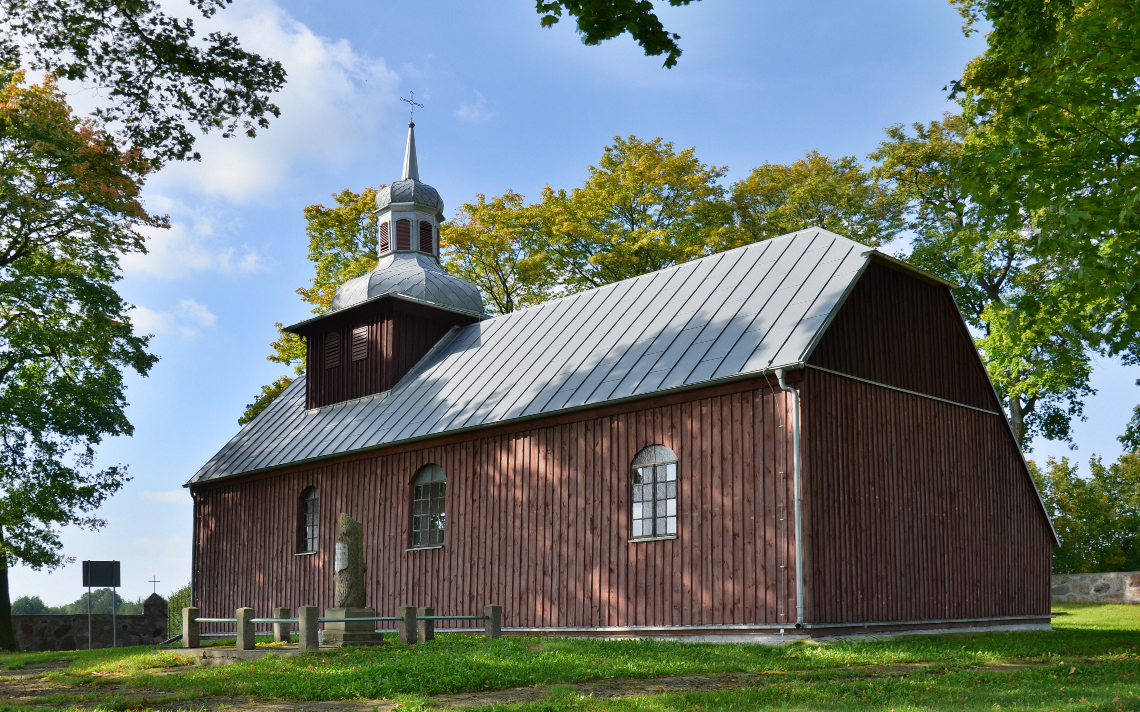 Księte, kościół fil. pw. Wniebowzięcia Najświętszej Marii Panny, drewn., XVIII/XIX